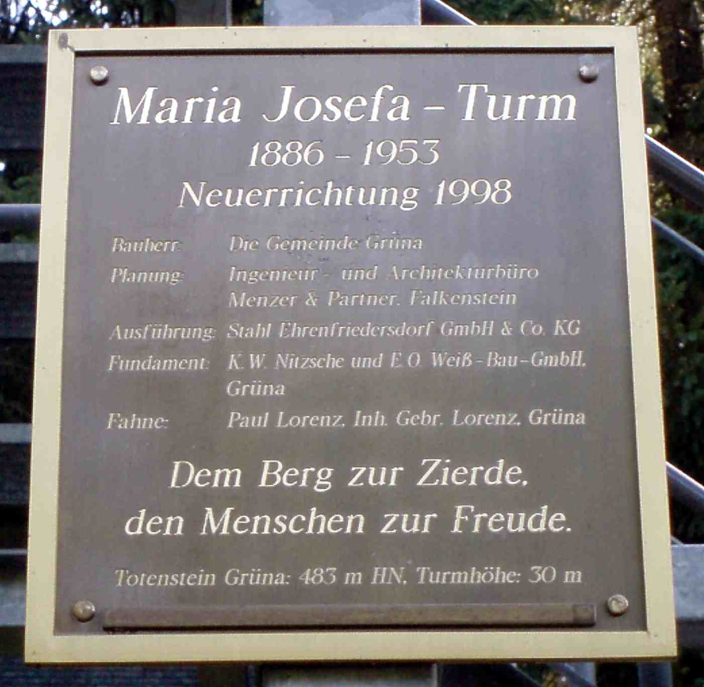 Tafel am Maria-Josepha-Turm auf dem Totenstein bei Chemnitz-Grüna